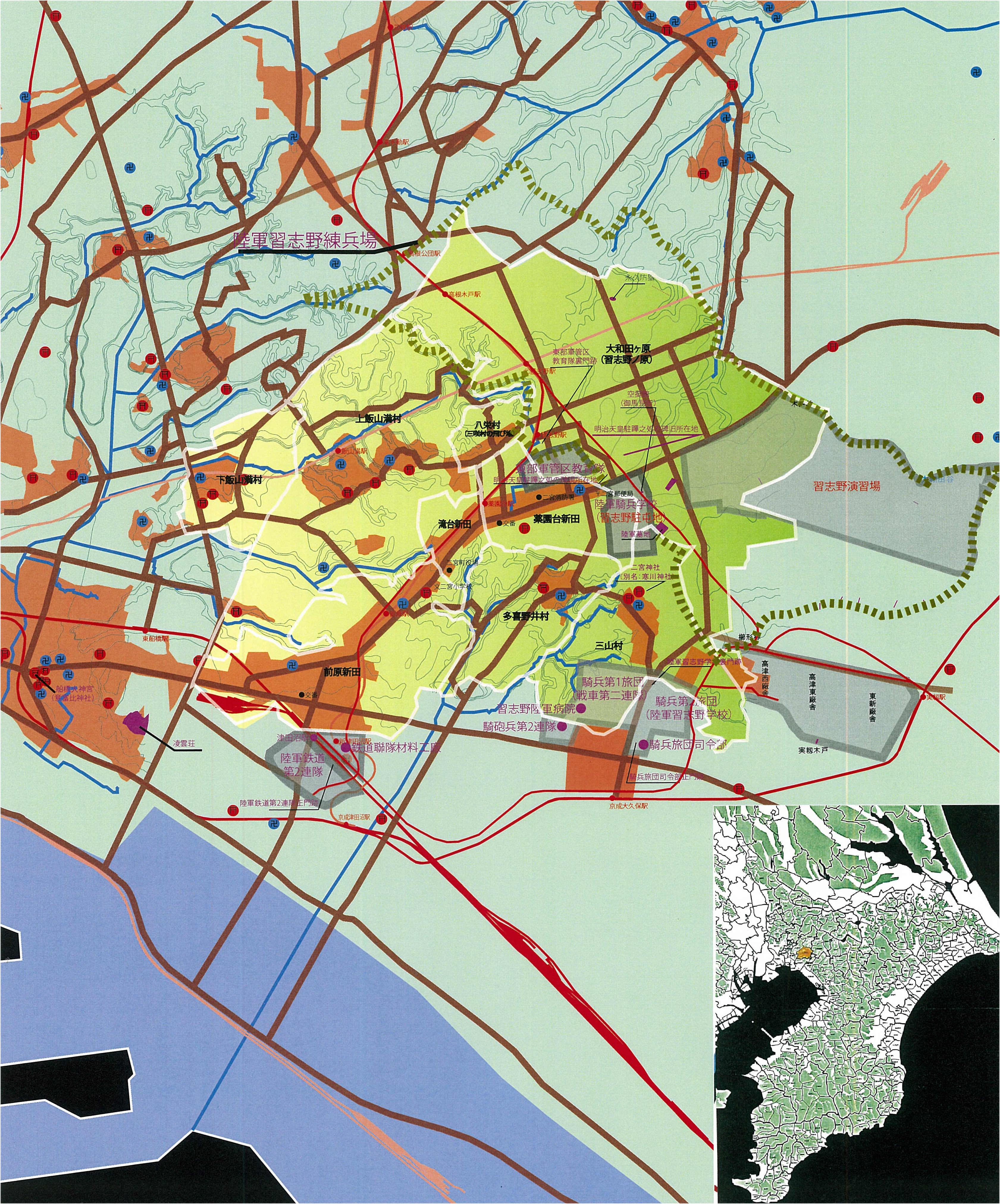 かつて千葉県に存在した二宮町（村）の町域を描いたマップである。